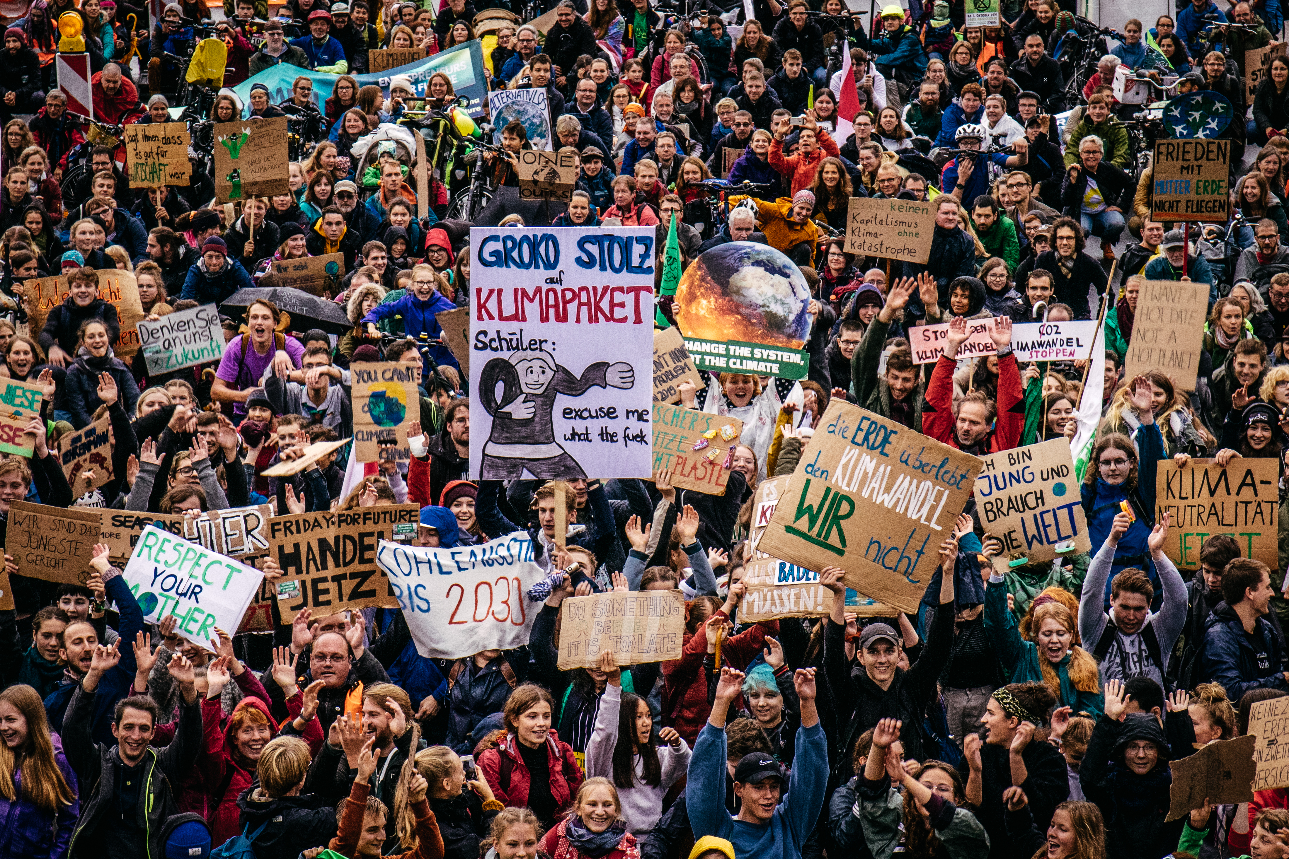 27.09.2019 - Zentraler Klimastreik in Erfurt